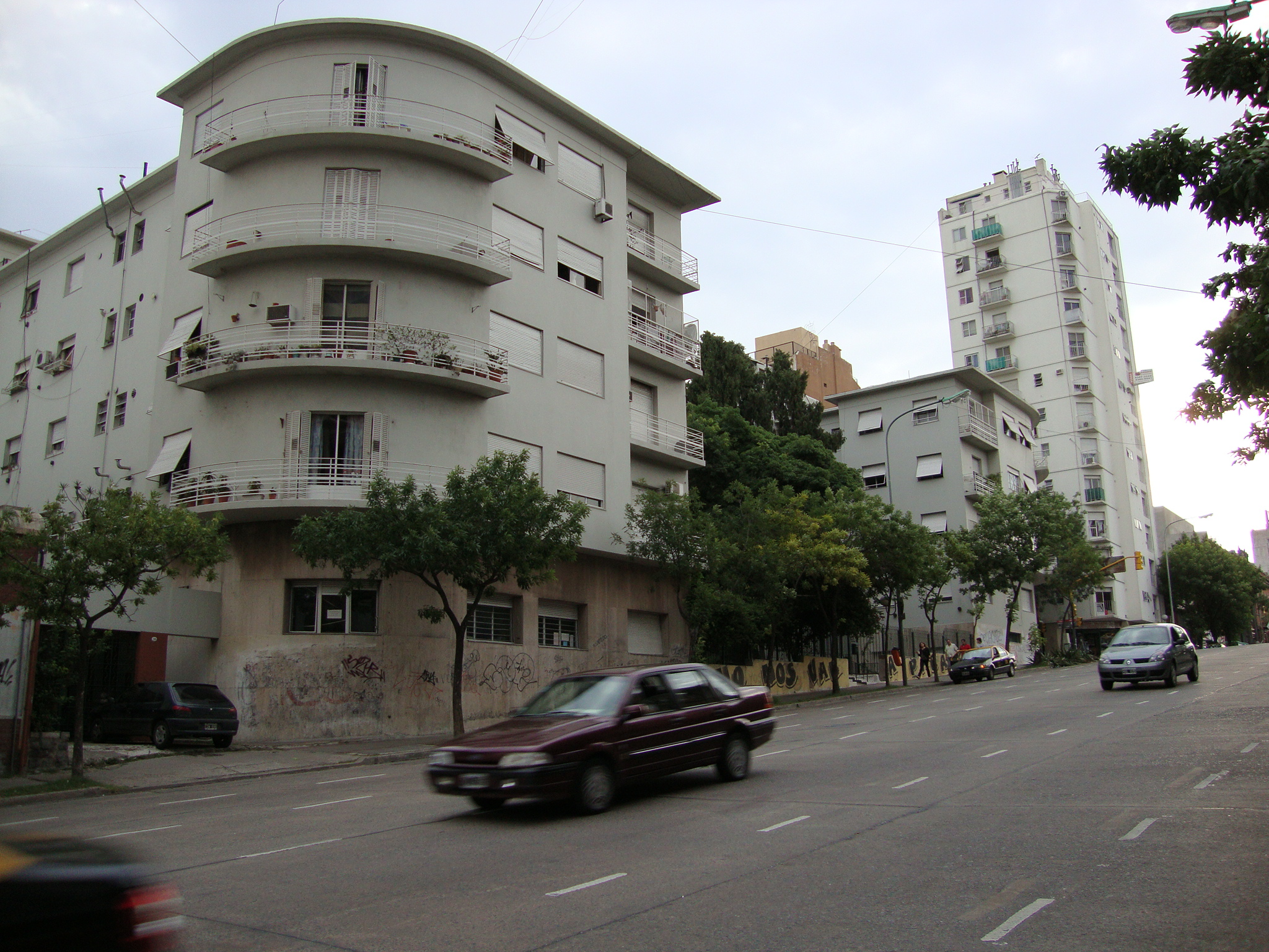 Casa Colectiva América, construida por la Comisión Nacional de Casas Baratas, diseñada por Estanislao Pirovano e inaugurada en 1939. Avenida San Juan y Balcarce, barrio de San Telmo, ciudad de Buenos Aires, Argentina.